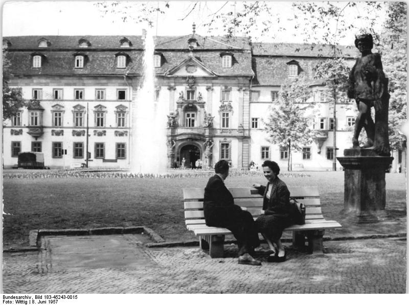 Erfurt, Parkanlage Zentralbild Wittig 8.6.1957 Voi-Hoe. Stolze Aufbauerfolge der Bezirkshauptstadt Erfurt. Während die Gesamtausgaben des Haushaltplanes von Erfurt im Jahre 1938 31,4 Millionen DM umfaßten, betrugen sie im Jahre 1956 69,2 Millionen DM und 1957 77.7 Millionen DM bei einem Ansteigen der Bevölkerungsziffer von 165700 Einwohner im Jahre 1938 auf 186800 im Jahre 1956. Allein die Gesamtausgaben für Volksbildung, Kultur, Jugend, Sport, Sozial- und Gesundheitswesen steigerten sich von 1938 - 14 Millionen DM auf 50,7 Millionen DM im Jahre 1956 und 55,3 Millionen DM im Jahre 1957. Hinzu kommen noch die Mittel, die den Arbeiter-Wohnungsbau-Genossenschaften von den Trägerbetrieben und den staatlichen Instituten für ihre Bauten zur Verfügung gestellt wurden sowie vor allem die Werte, die von der Bevölkerung in freiwilligen Arbeitseinsätzen geschaffen wurden. UBz: Durch die Errichtung und laufende Erweiterung neuer Grünanlagen konnte die Stadt Erfurt ihren Ruf als Blumenstadt weiter festigen. Blick auf den 1955 56 von den Kollegen der Wasserwirtschaft in freiwilligen Arbeitsstunden errichteten Springbrunnen am Platz der DSF.